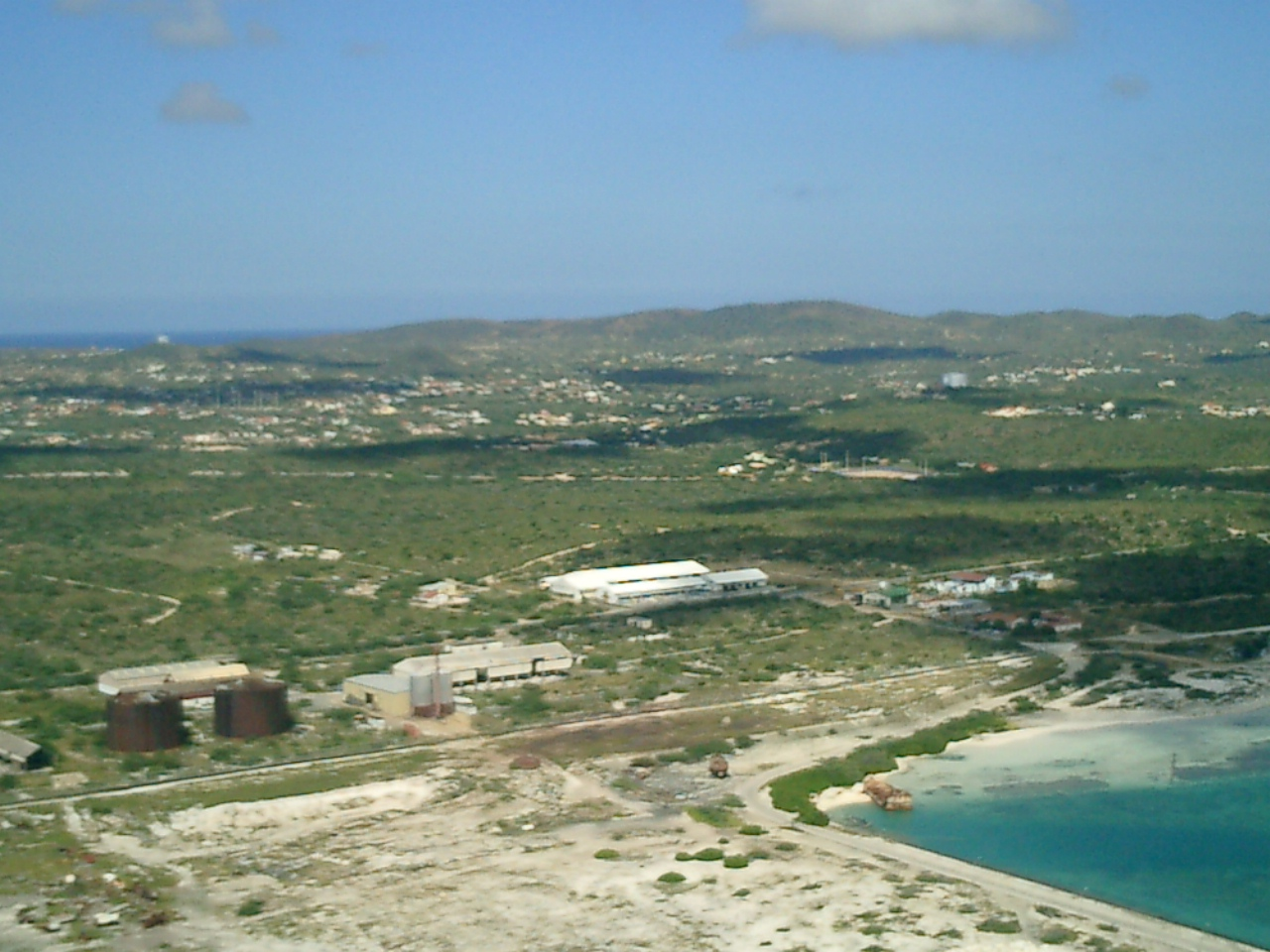 Perkietenbos